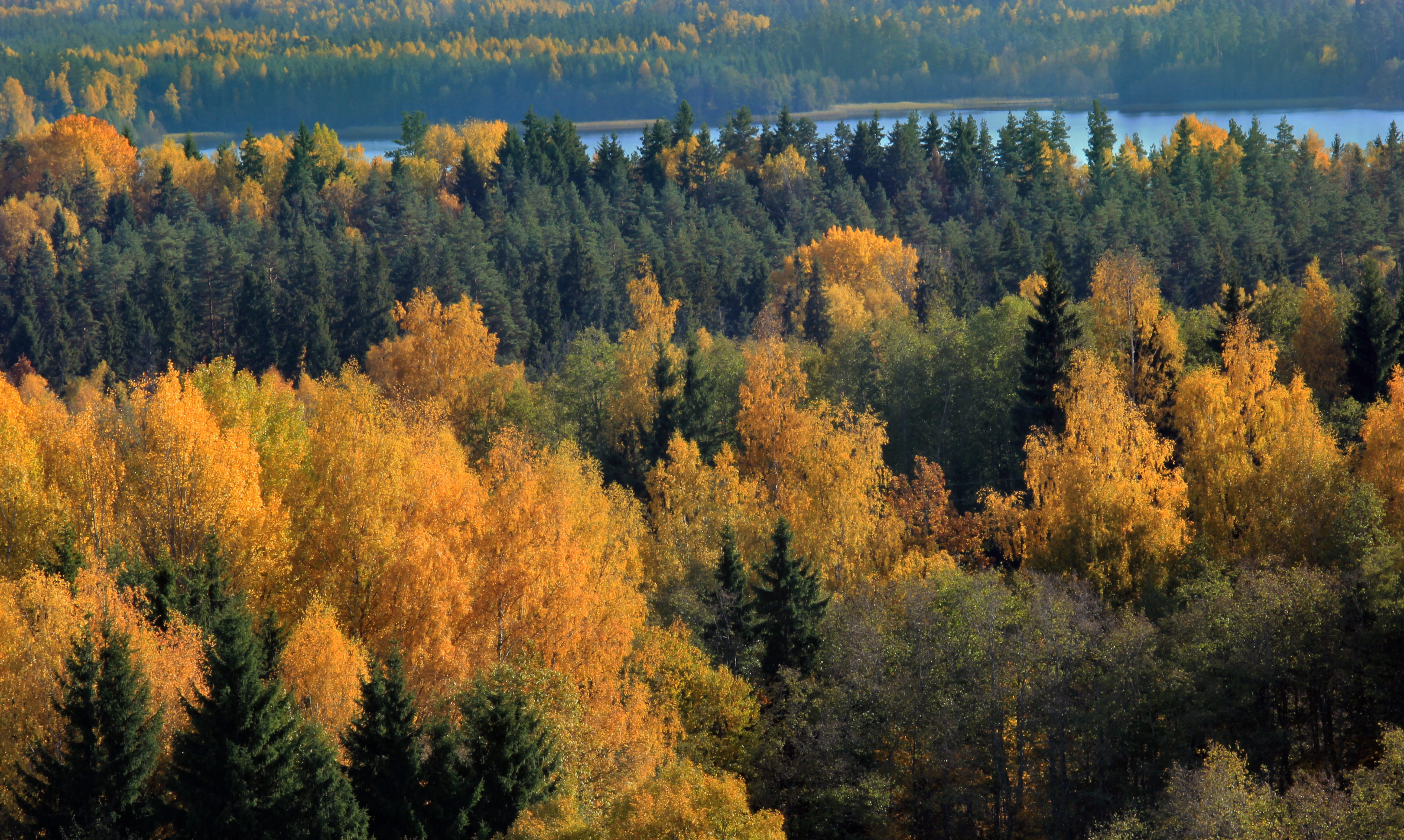 Ähijärv Mäekonnu vaatetornist